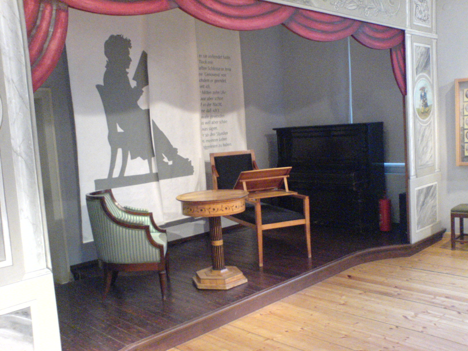 Bühne im Romantikerhaus in Jena (Deutschland).